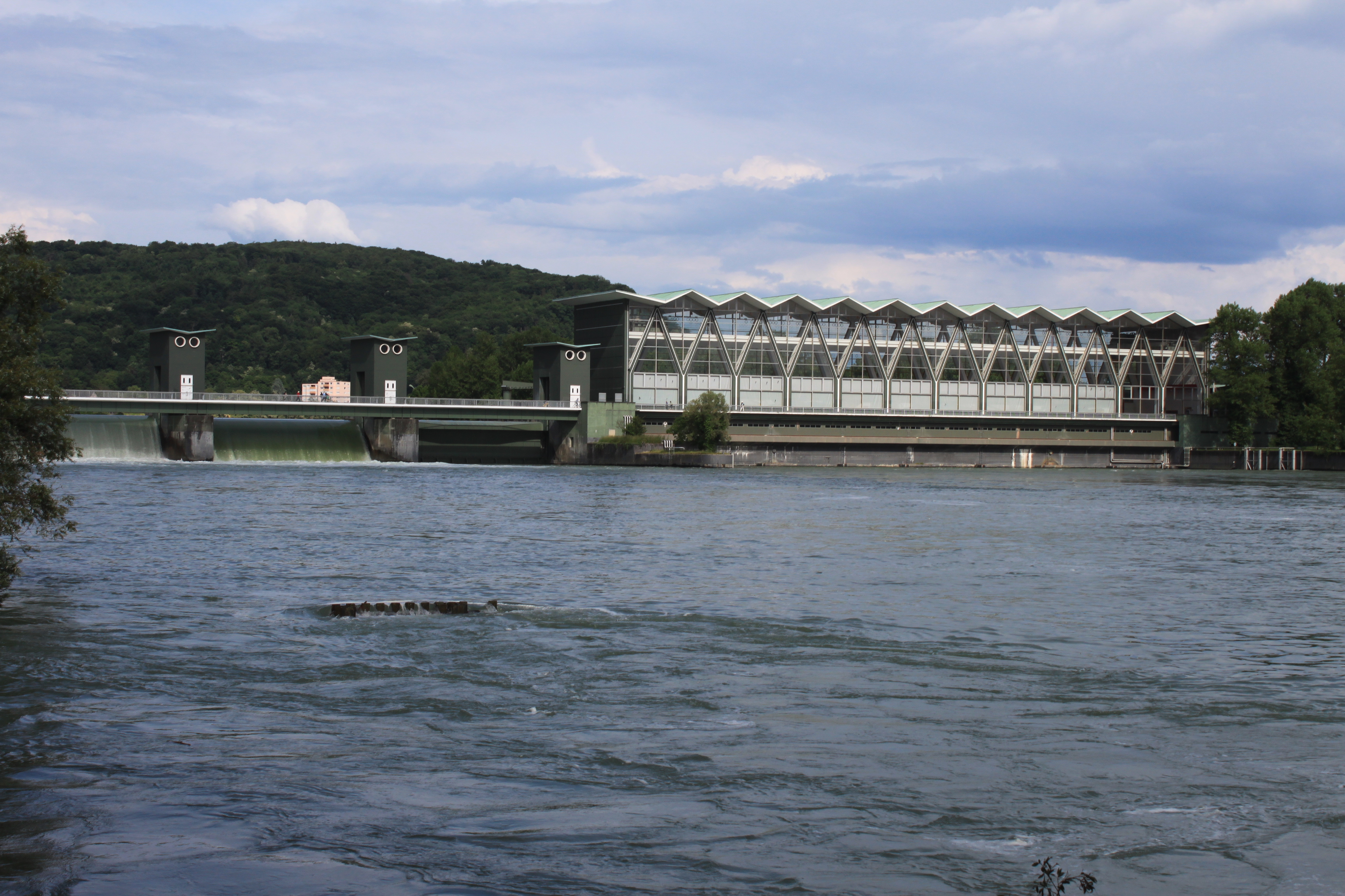 Kraftwerk Birsfelden von flußabwärts